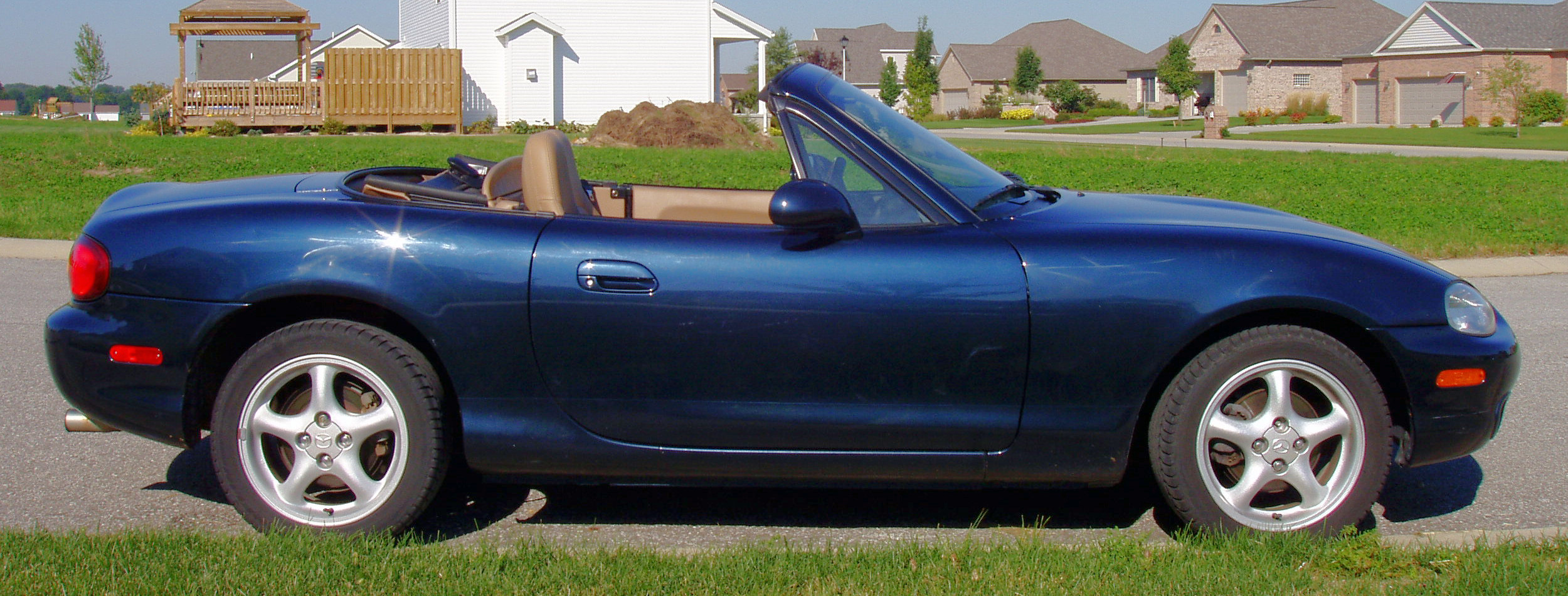 Mazda Miata, un descapotable moderno 1999 Mazda Miata. Photo shot by Derek Jensen (Tysto), 2002-September-17